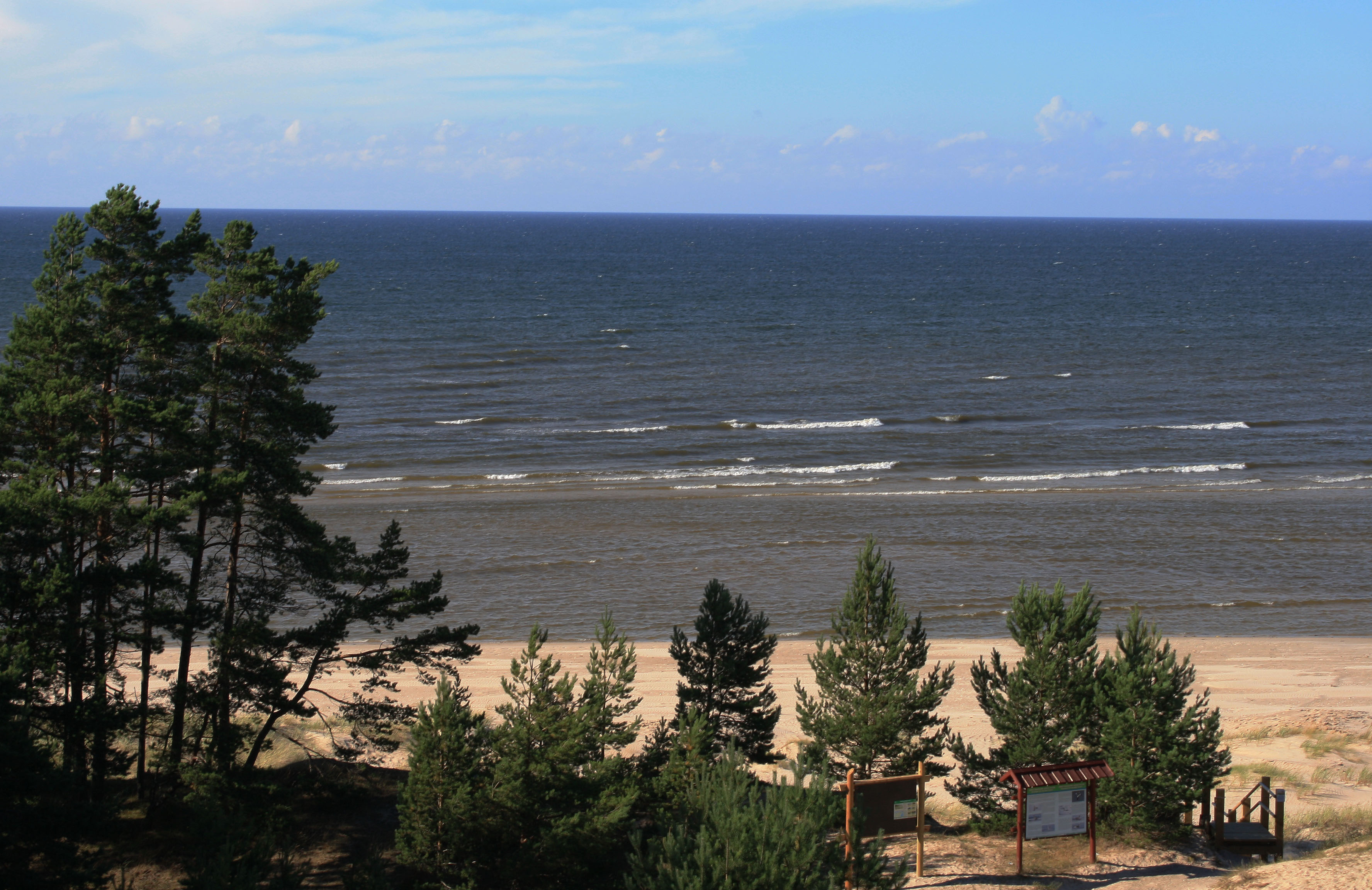 Мыс Колка (Латвия) Чёткая линия горизонта